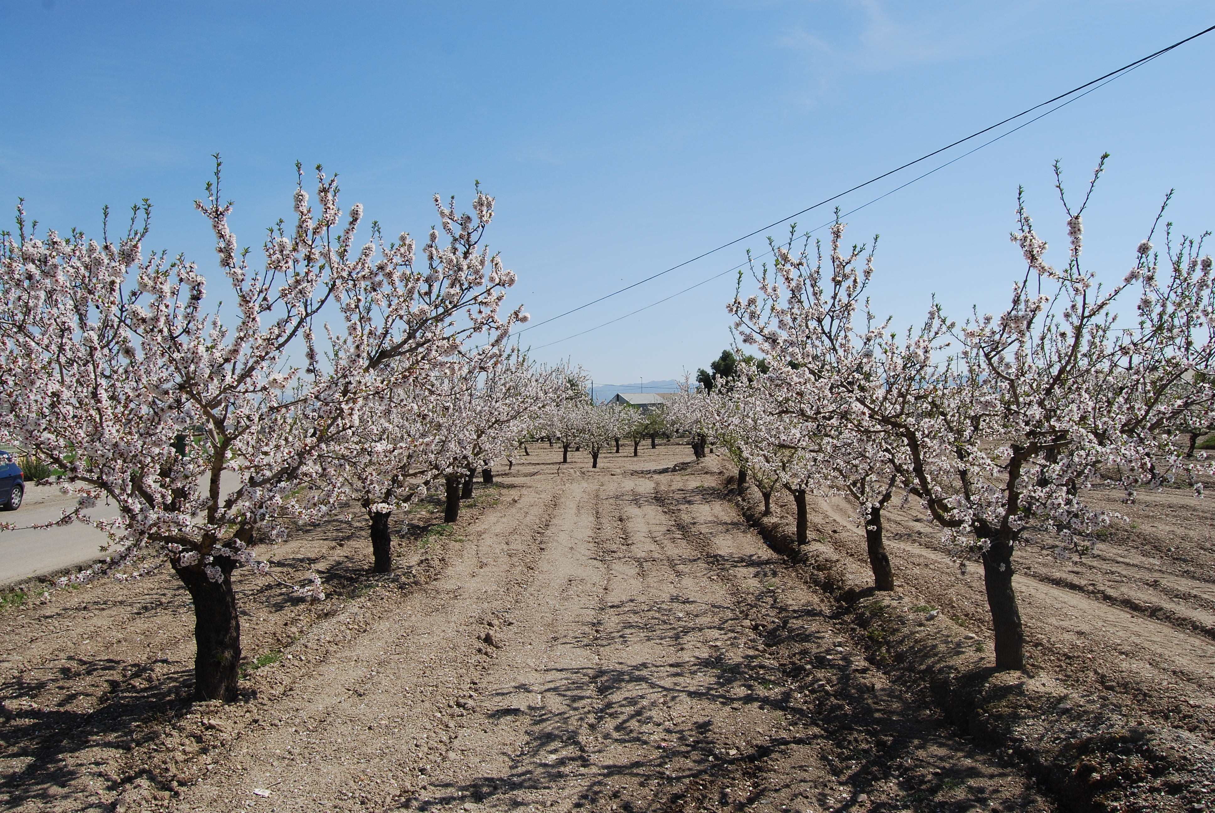 Vista de una plantación de Almendros en flor en la pedanía de El Esparragal